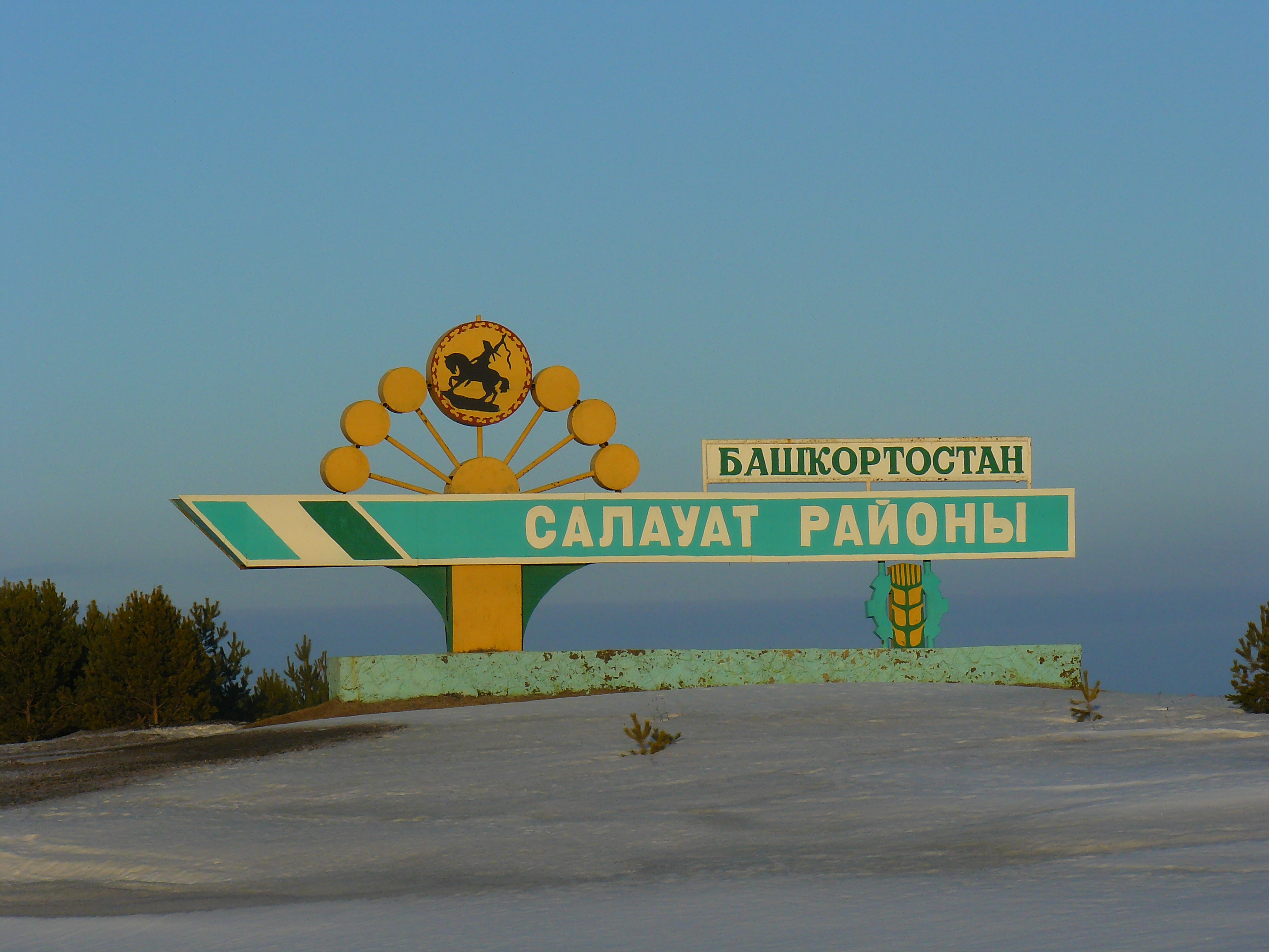 В'їзний знак до Салаватського р-ну Башкортостану